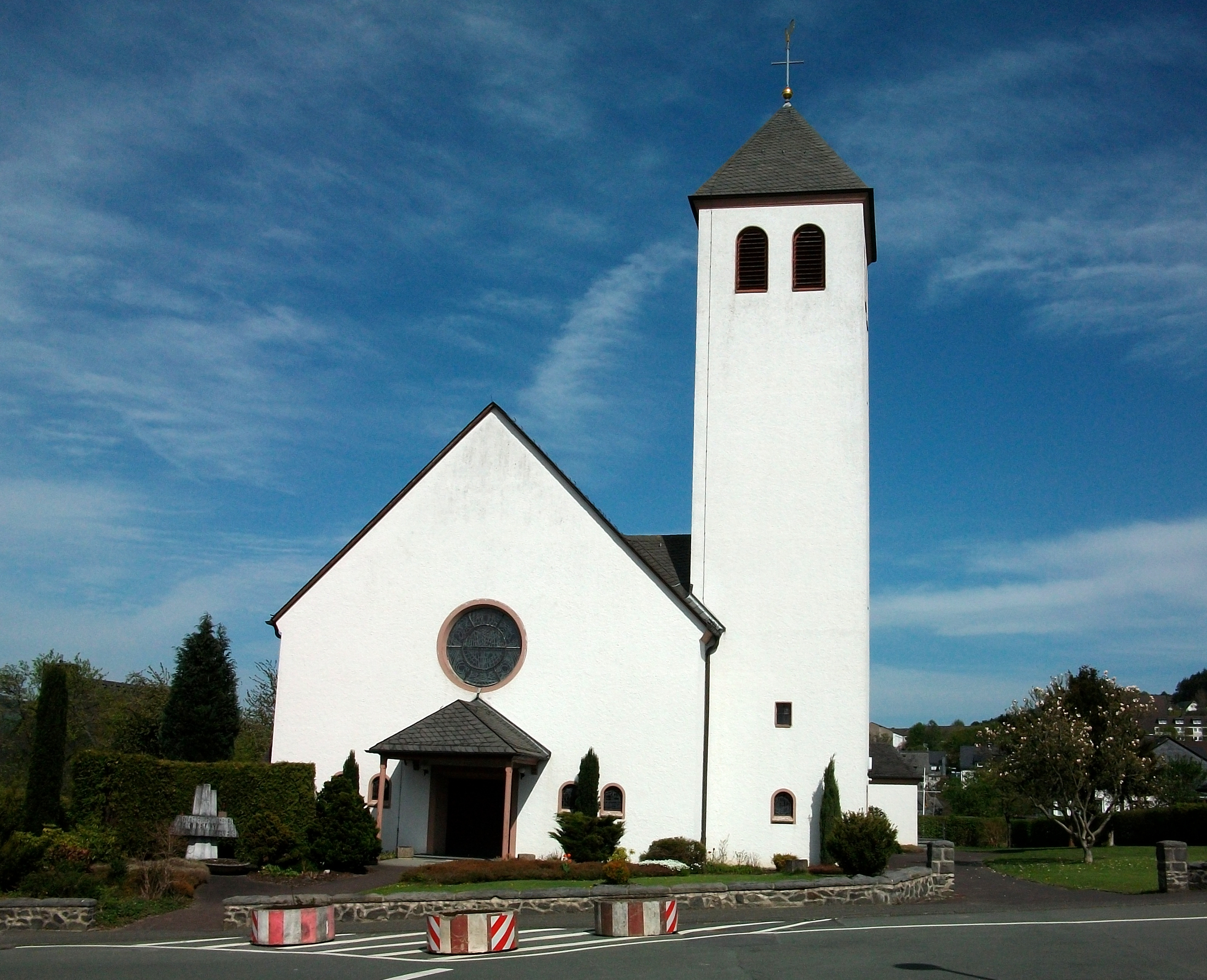 Bestwig, Kirche (Germany)